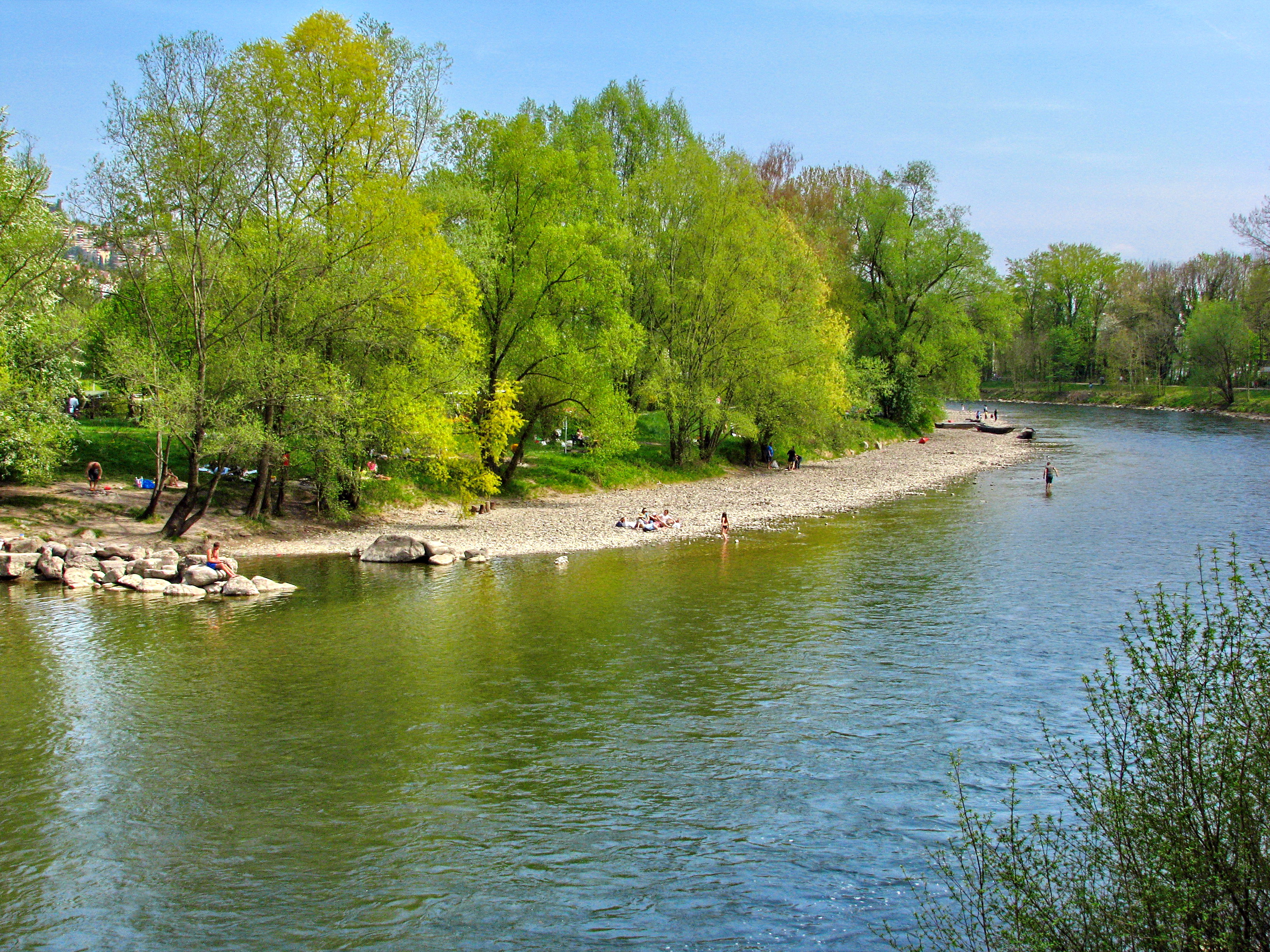 Werdinsel in Zürich-Höngg